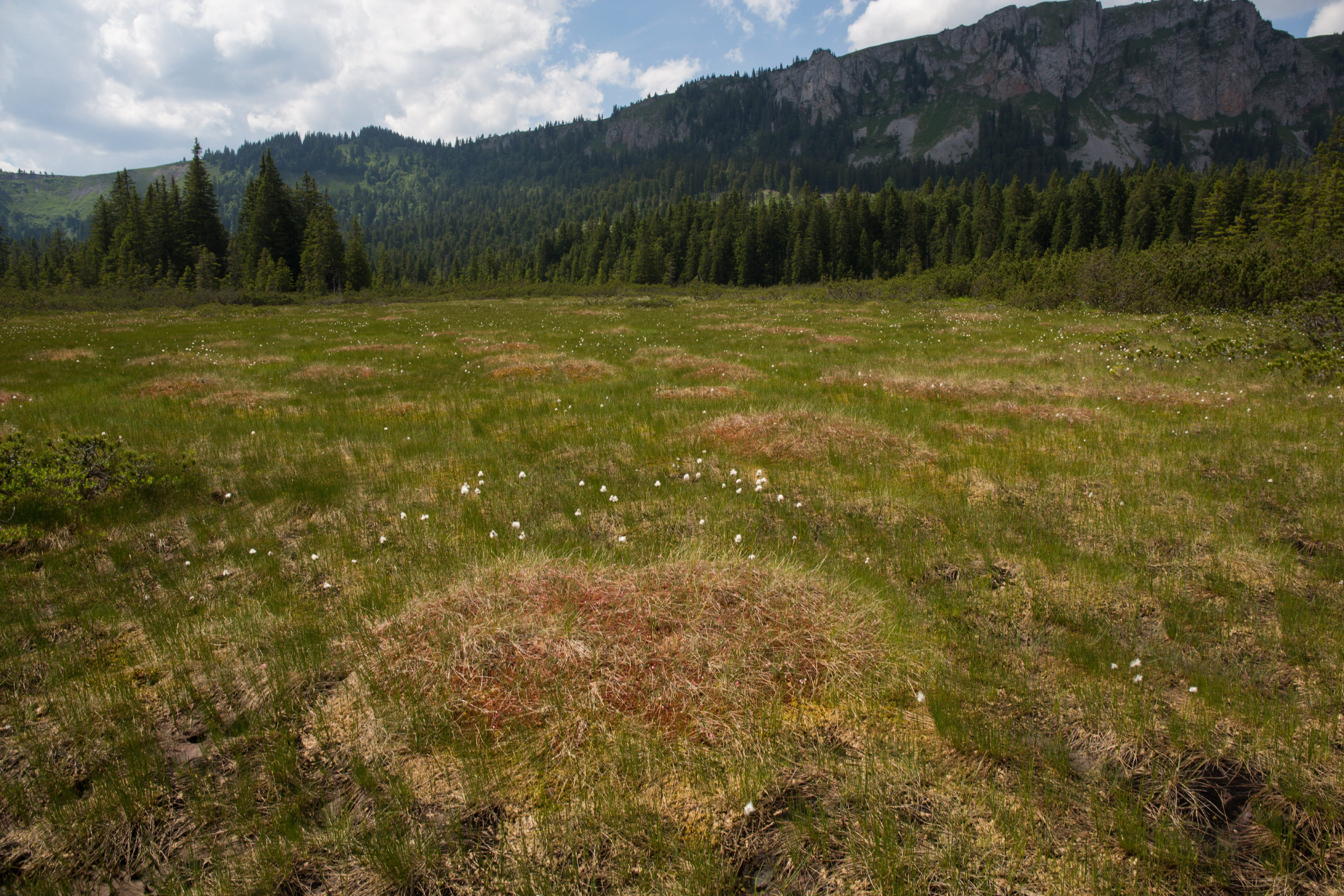 Naßkör This media shows the nature reserve in Styria with the ID NSG a 08.